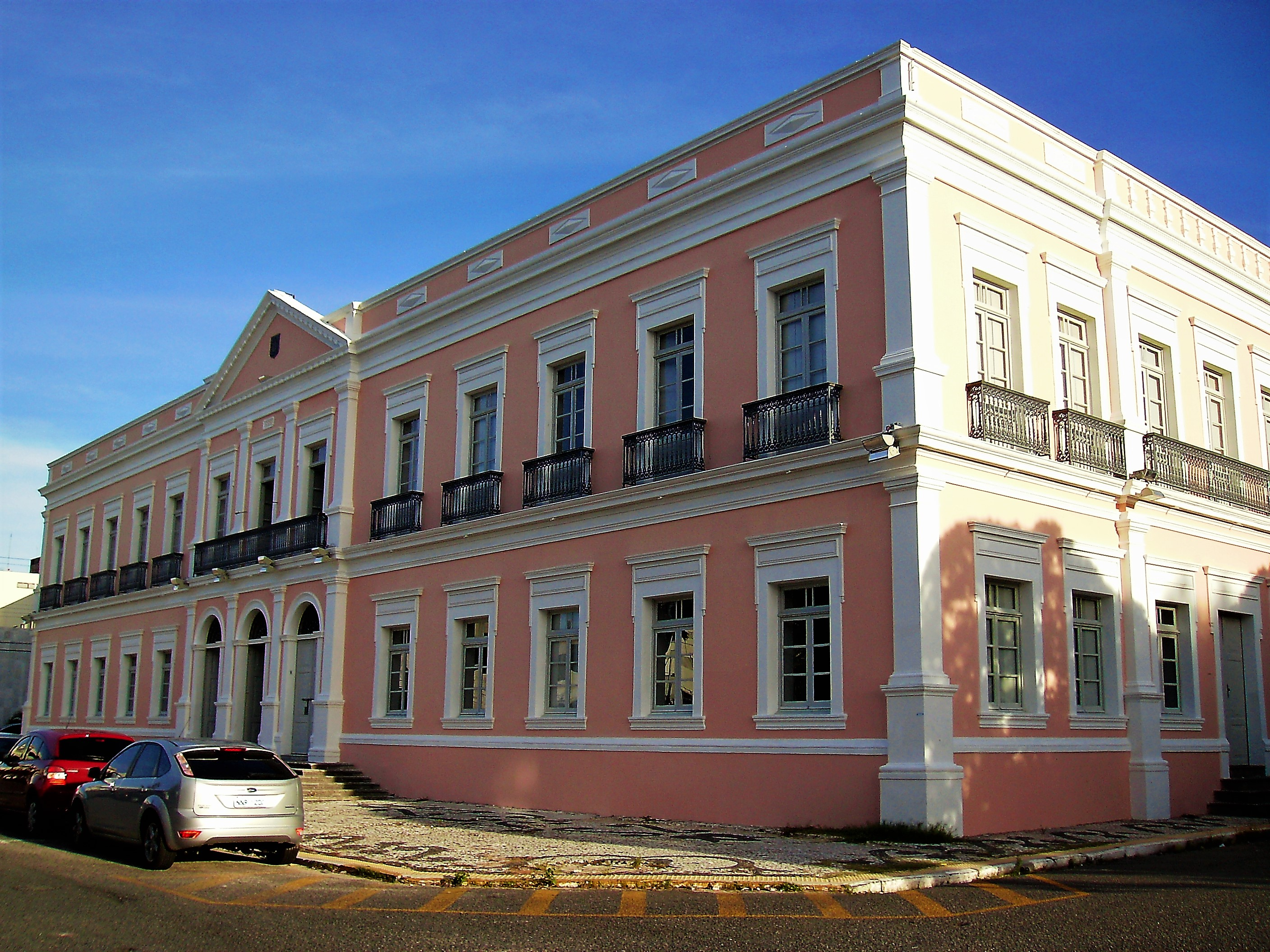 Palácio do Govêrno, à Praça Sete de Setembro